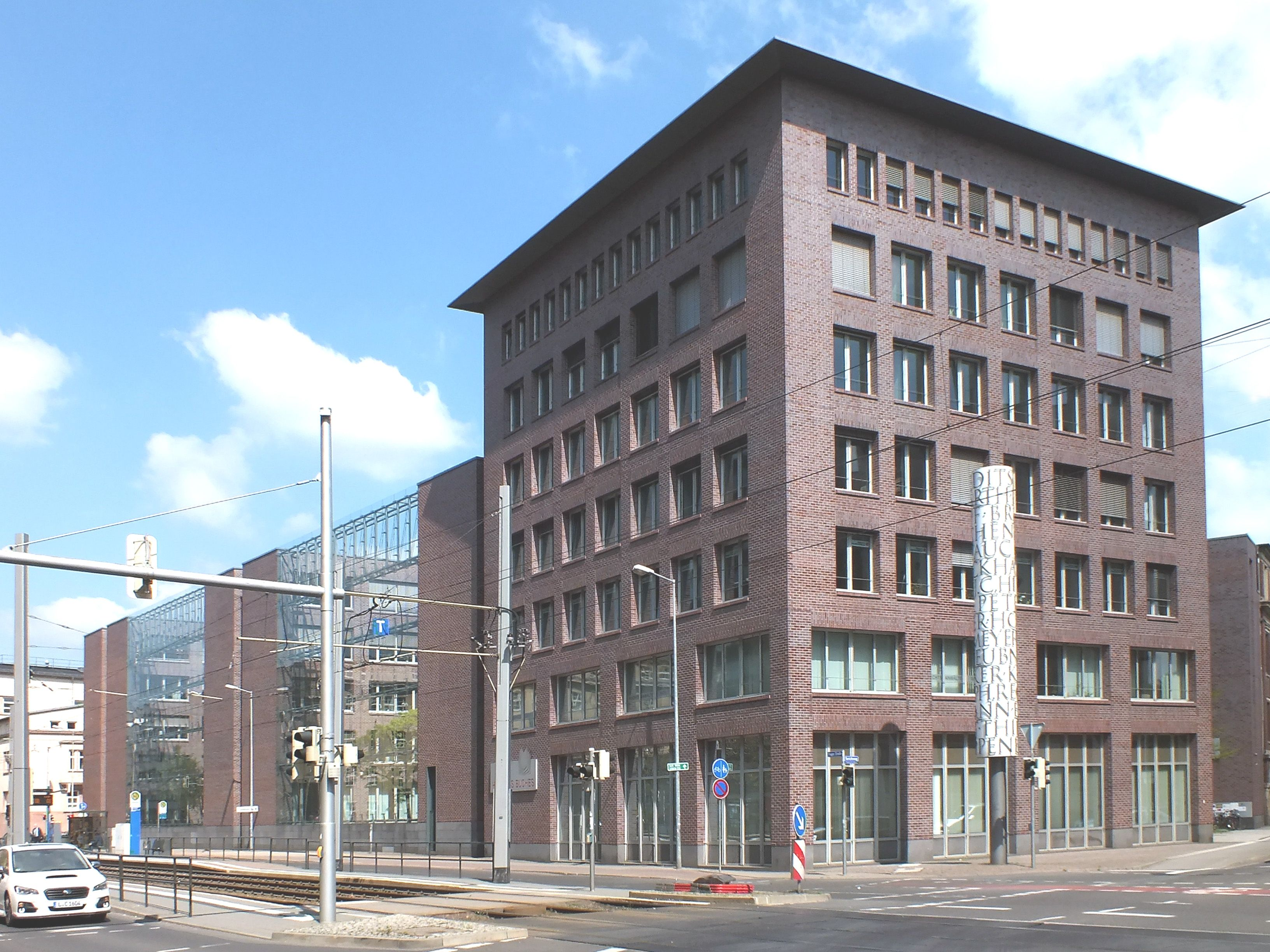 Das Haus des Buches in Leipzig von Süden